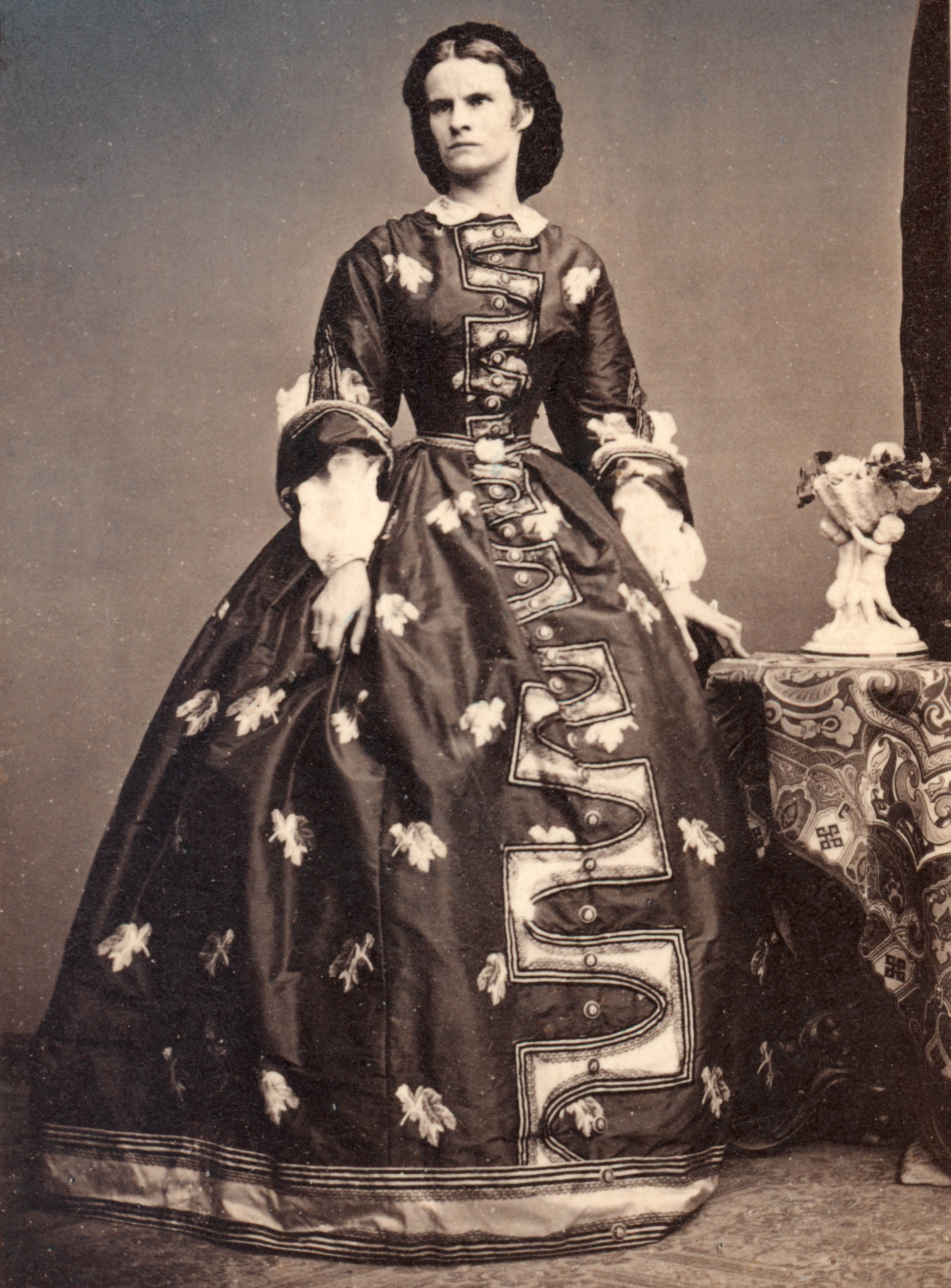 Prinzessin Helene in Bayern (1834-1890), Furstin von Thurn und Taxis